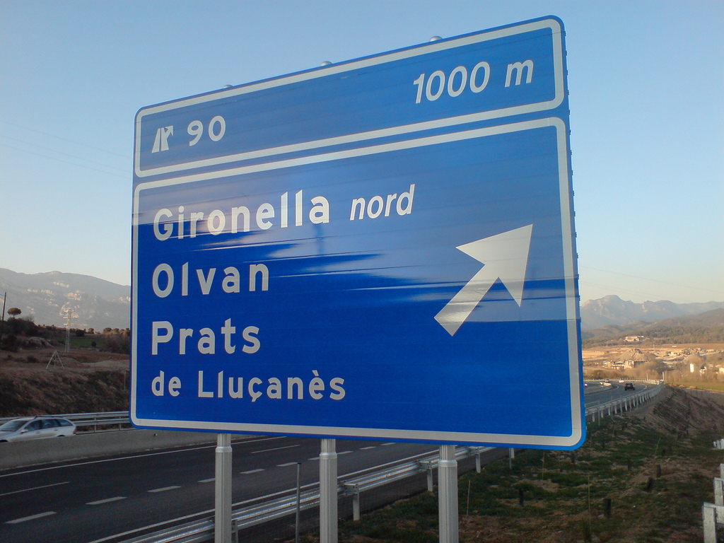 Cartell sortida 90 de l'autovia C16C16_sortida90